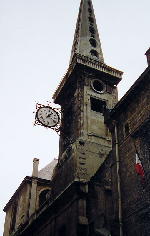 L'église Saint-Louis-en-l'île, Île Saint-Louis, Paris